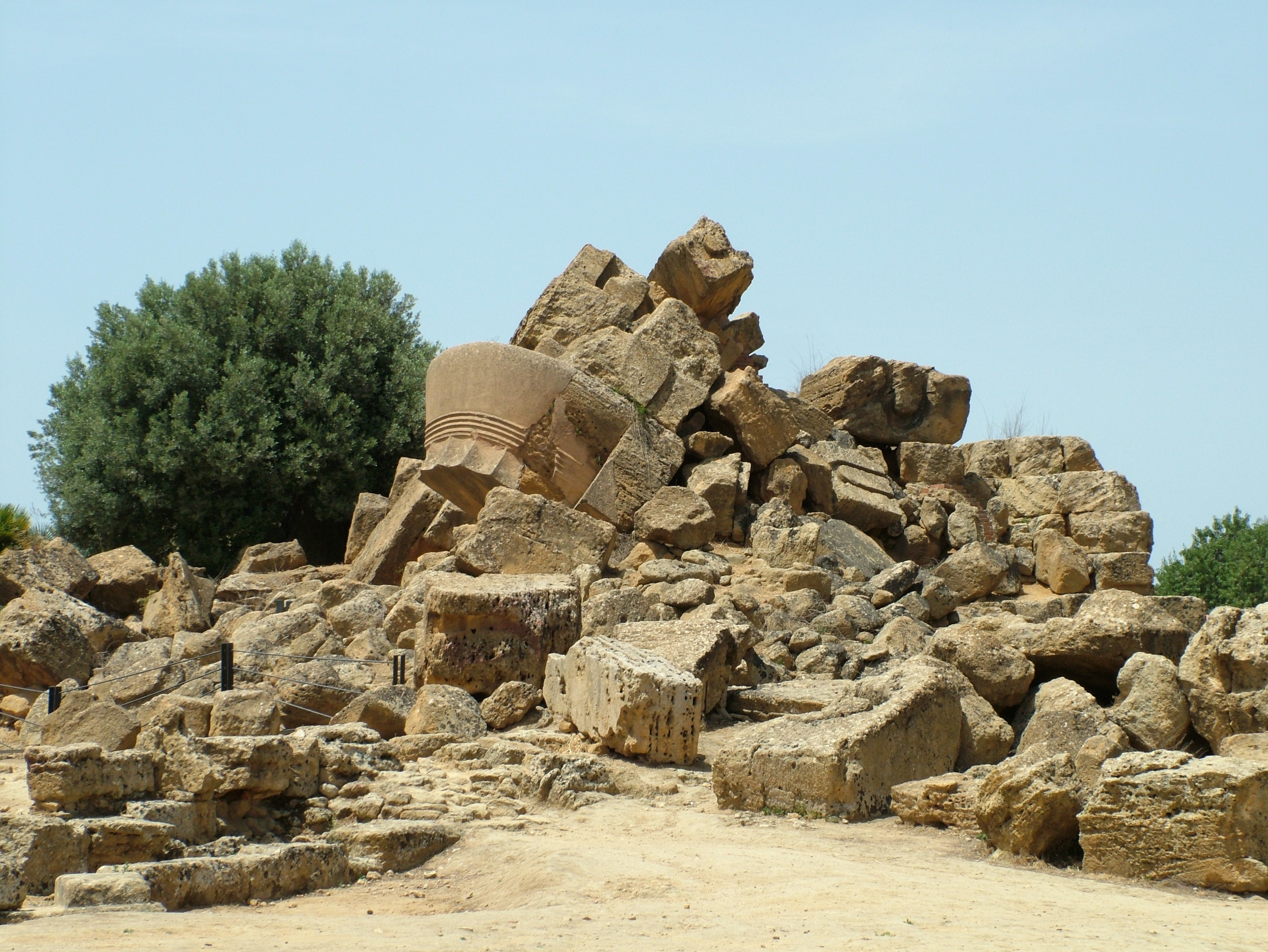 Der eingestürzte Zeustempel im westlichen Tempelbereich in Agrigent